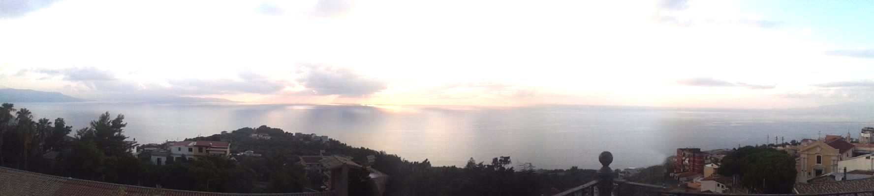 Panoramica villa comunale di Palmi